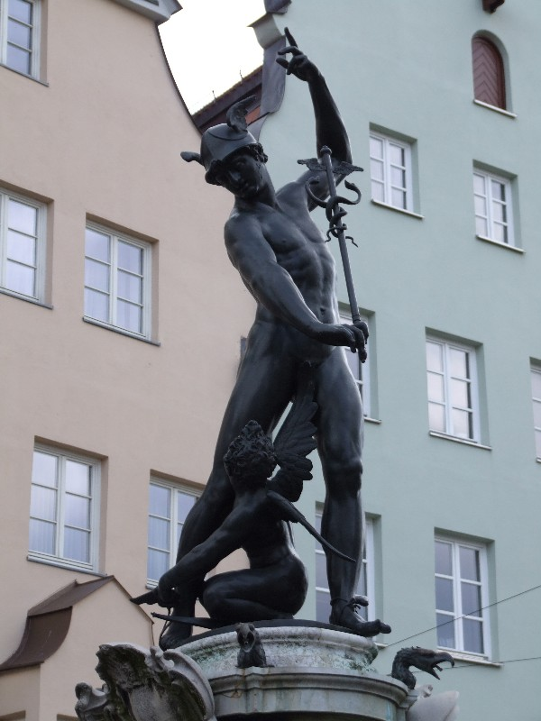 Merkurbrunnen in Augsburg, Germany